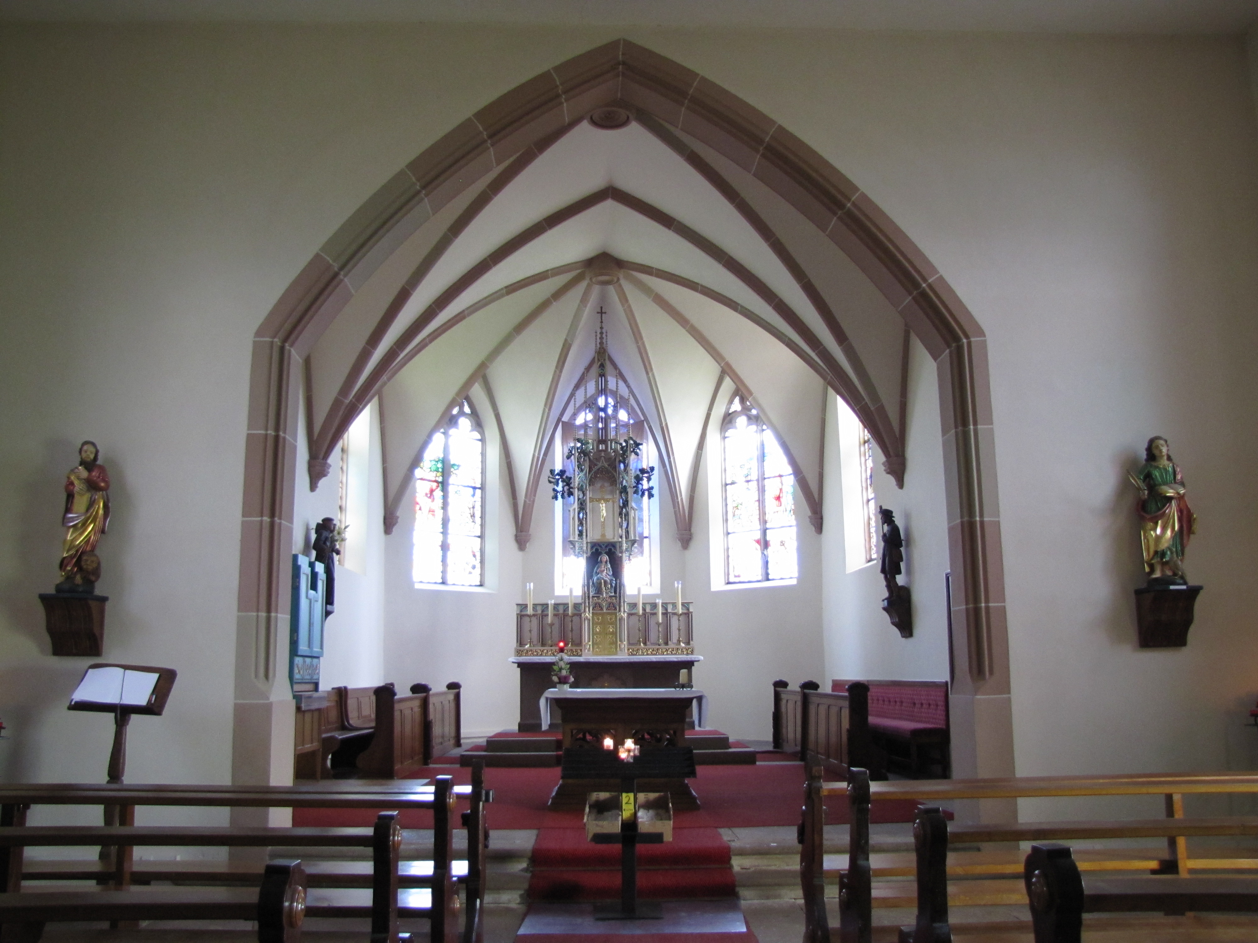 Alsace, Bas-Rhin, Plobsheim, Chapelle Notre-Dame du Chêne, Appartement du Waldbruder (1812): (PA00084895, IA00023121): Vue intérieure de la chapelle vers le chœur.